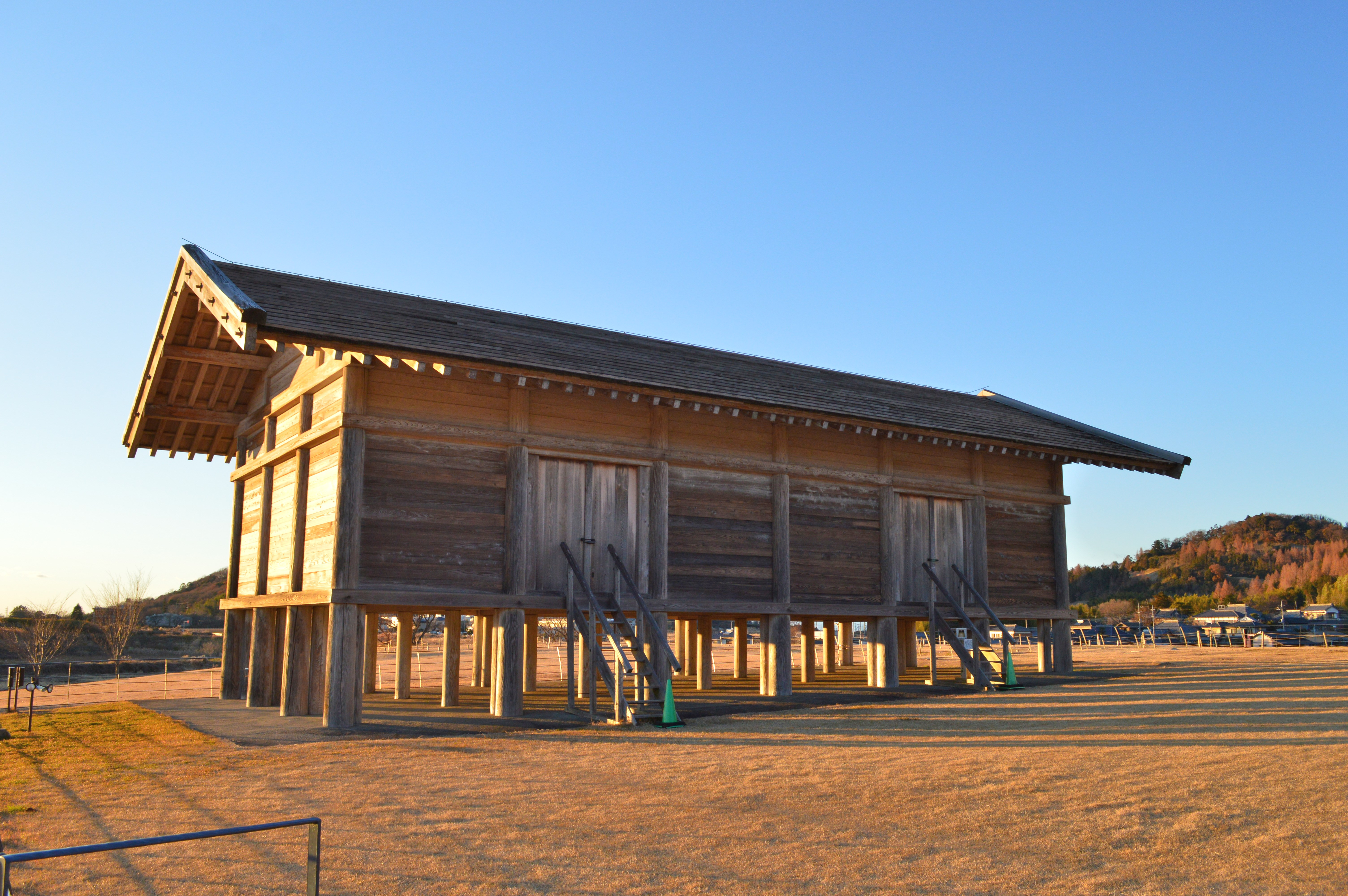 平沢官衙遺跡 板倉